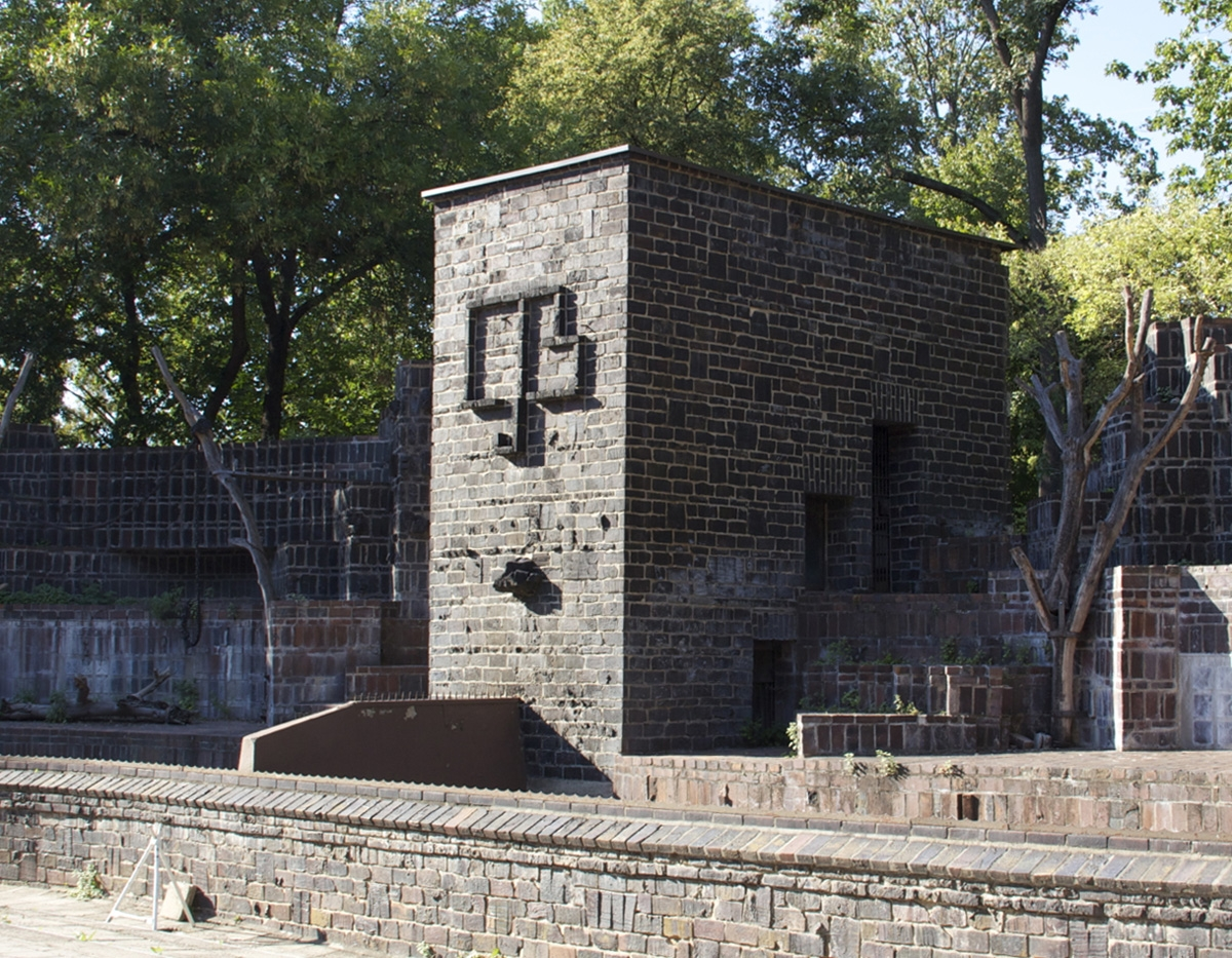 Photo der Bärenburg im zoo leipzig vor einer Umbau-/Umgestaltungsmaßnahme um sie neu zu nutzen.